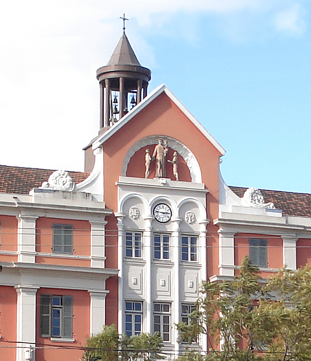 Detalhe do frontão do Instituto Pão dos Pobres, Porto Alegre, Brasil.